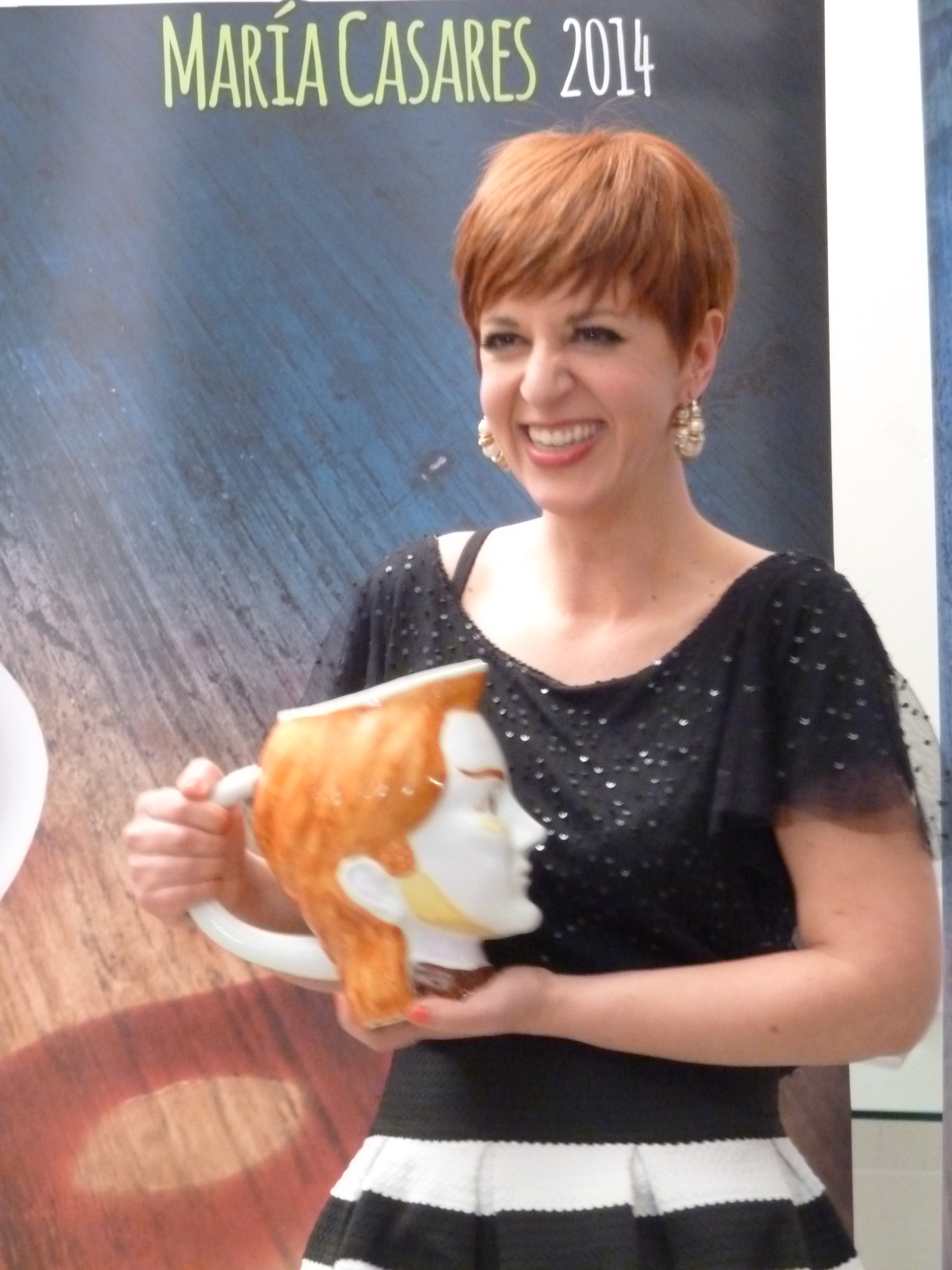 Marta Pazos na gala dos premios María Casares 2014.